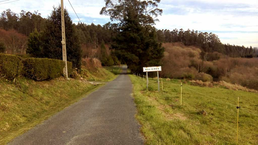 Vista dos Aguieiros, Cedeira.